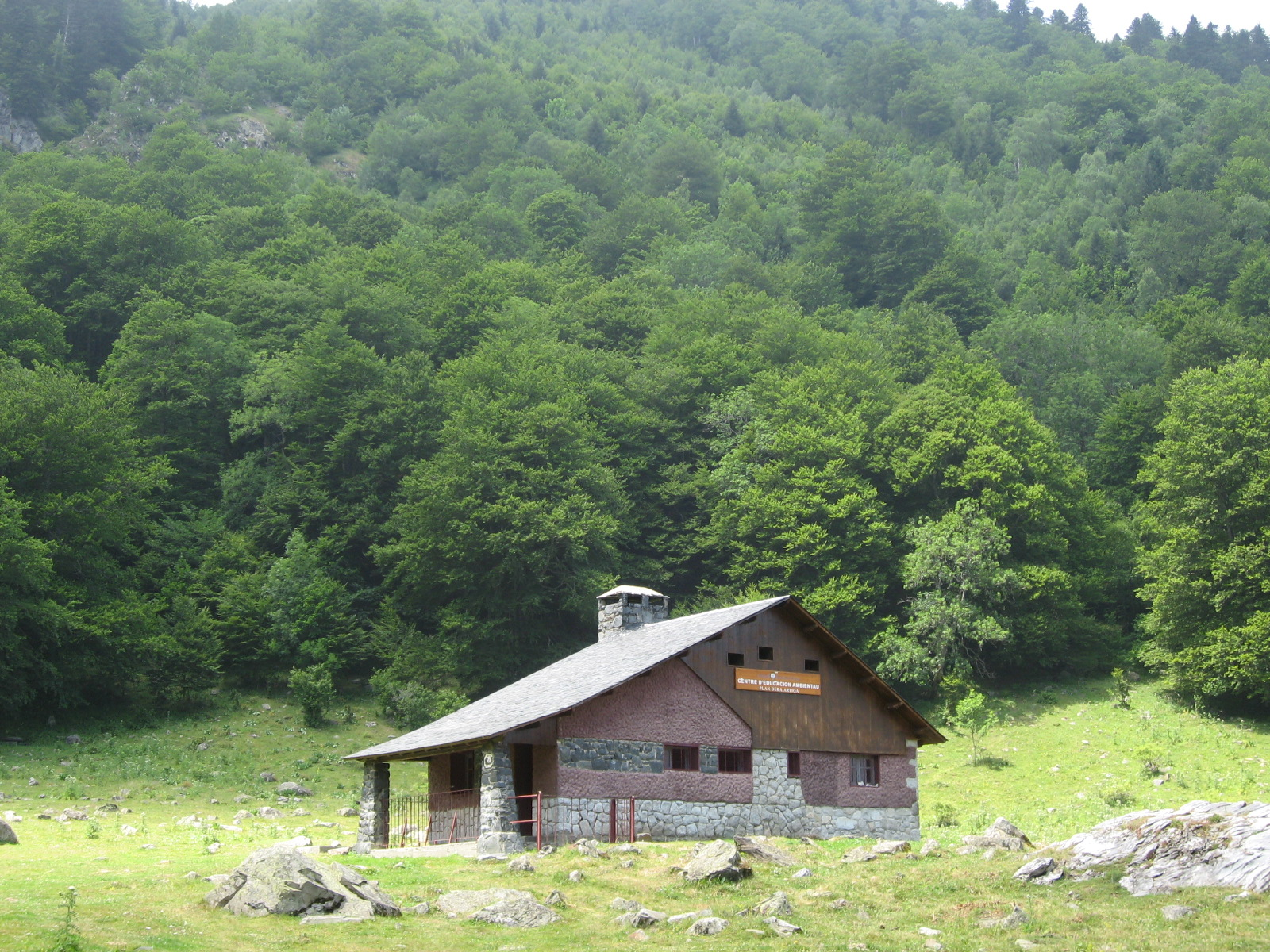 Refugi d'Artiga de Lin